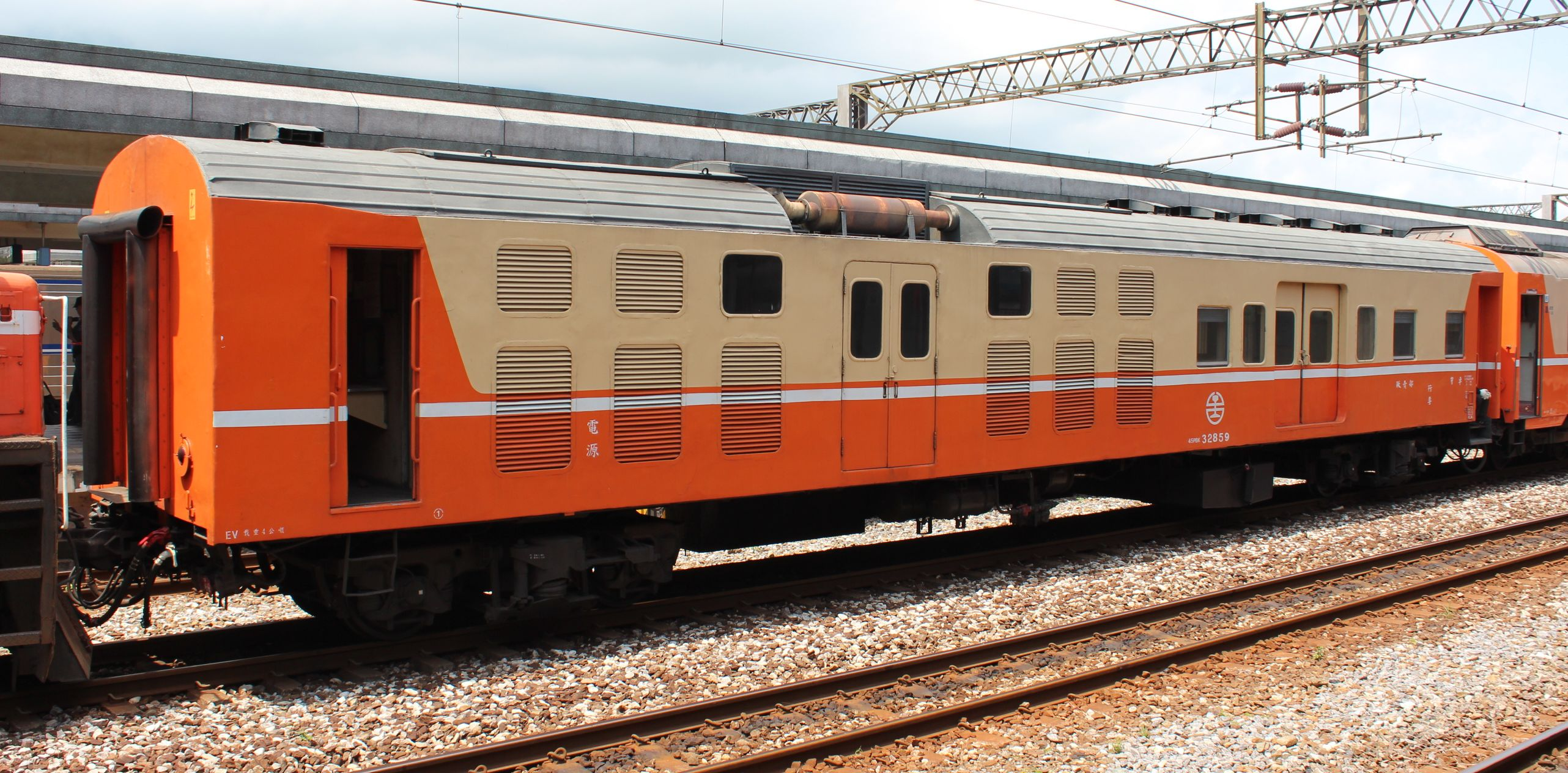 臺灣鐵路管理局電源行李車PBK32859，停靠花蓮車站。